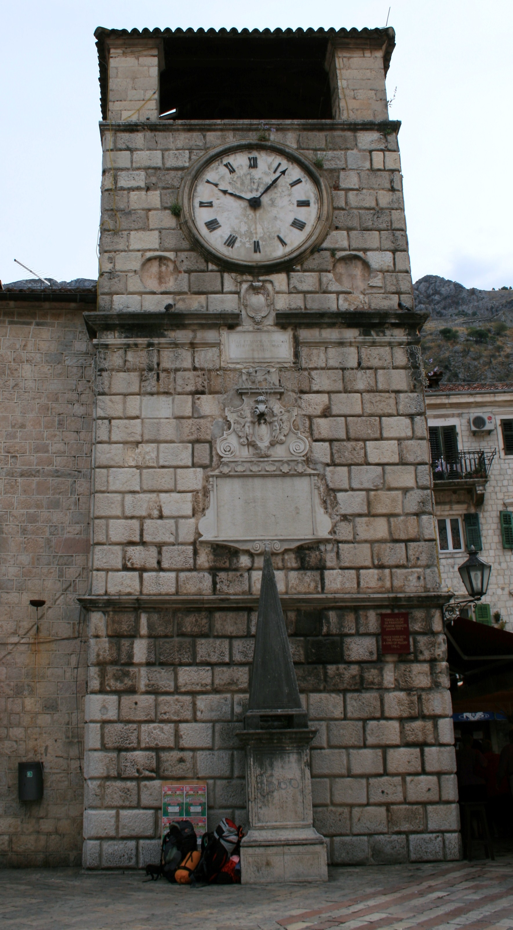 Часовая башня на площади Оружия в городе Котор, Черногория